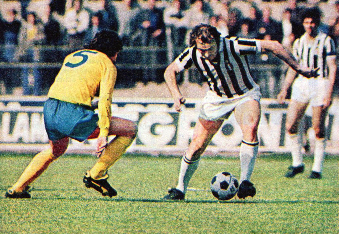 Torino, stadio Comunale, 11 aprile 1973. L'attaccante dei Bianconeri, José Altafini (a destra), in dribbling sul difensore dei Rams, Roy McFarland (a sinistra), nella sfida tra Juventus e Derby County (3-1) valevole per la semifinale di andata della Coppa dei Campioni 1972-73; nell'occasione la squadra ospite indossò la sua divisa di cortesia gialloblù.